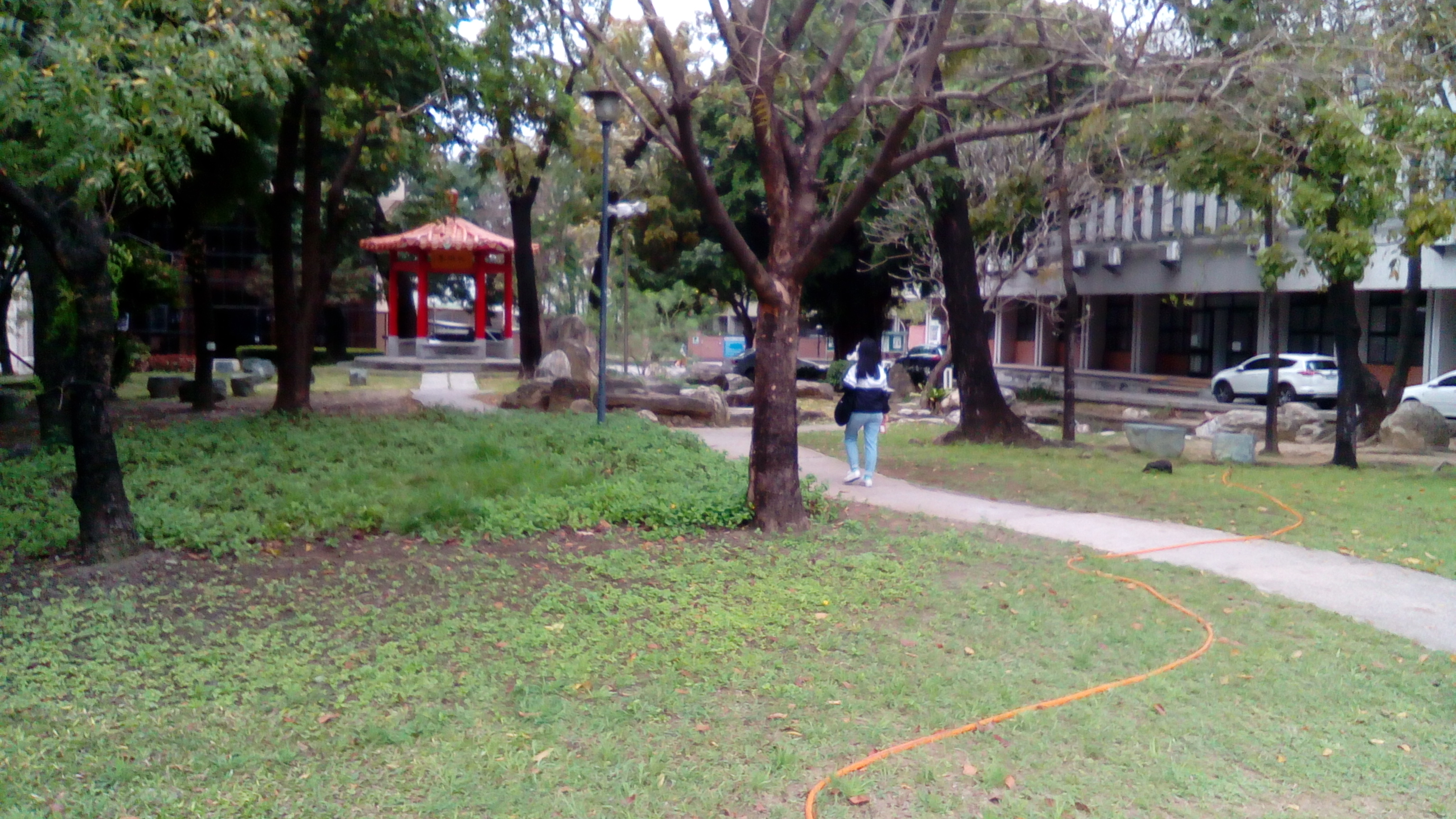 位於校園西南隅 運動場旁